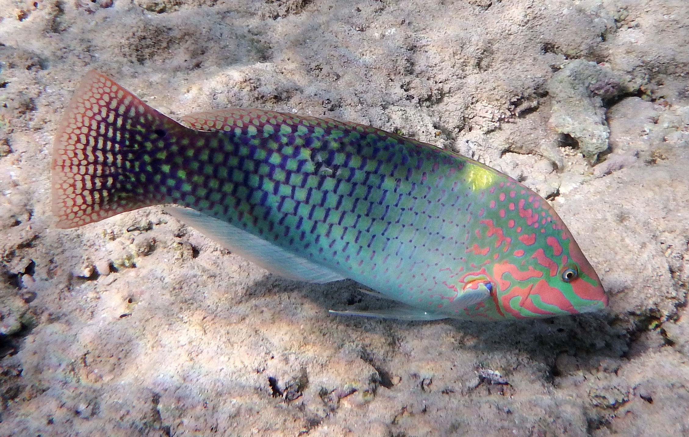 Halichoeres hortulanus im Roten Meer.VIDEO